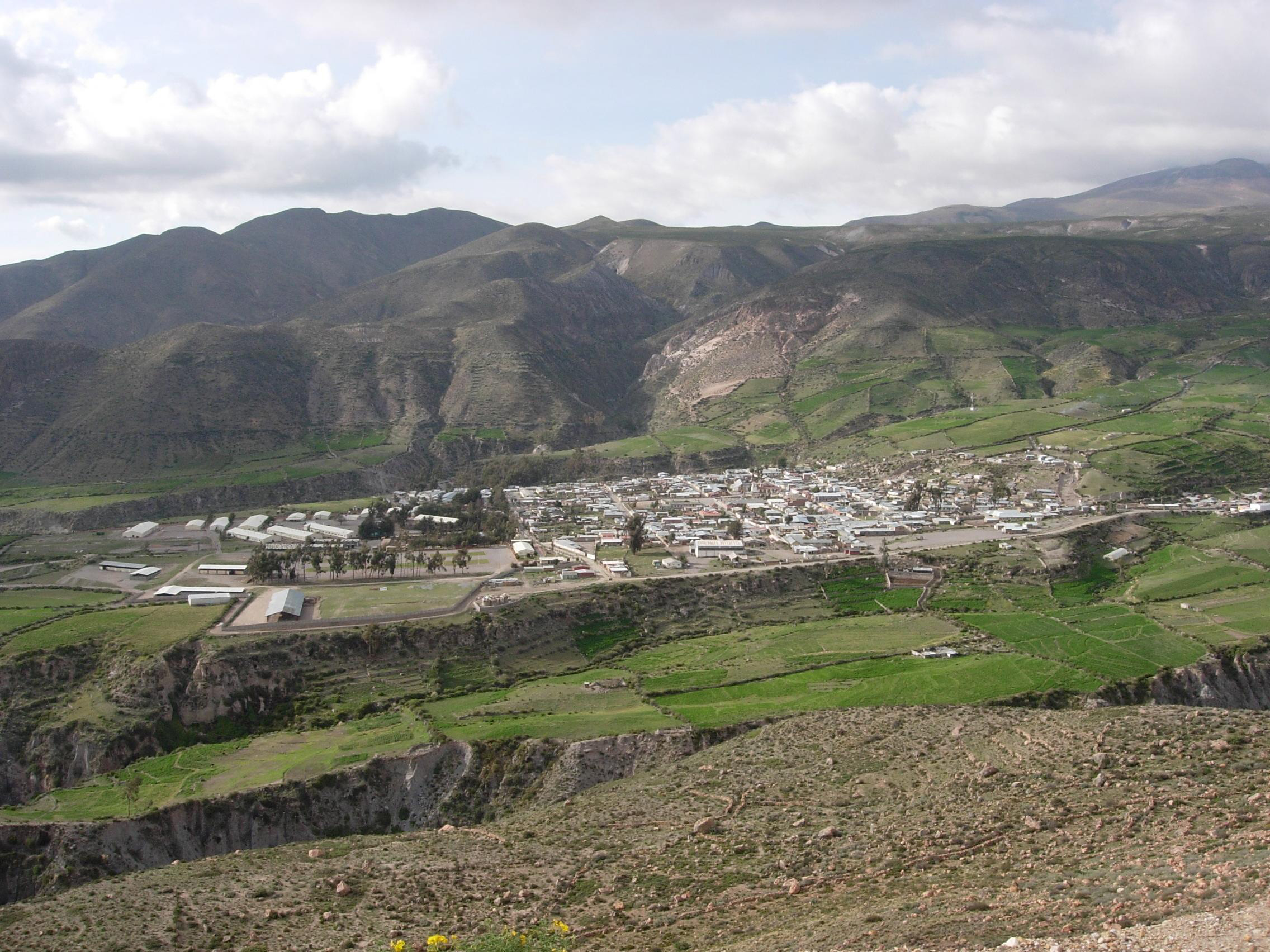 Putre (Chile) liegt friedlich im Tal (selbst fotografiert)